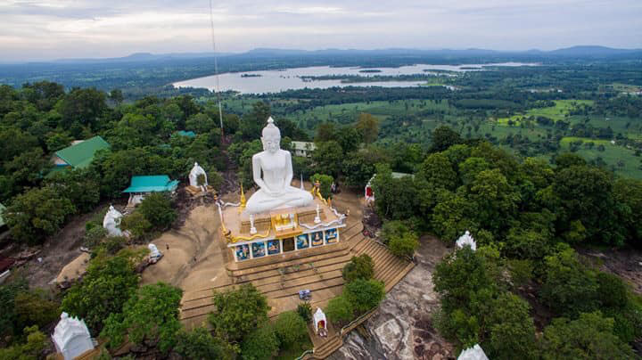 พุทธอุทยานภูสูง